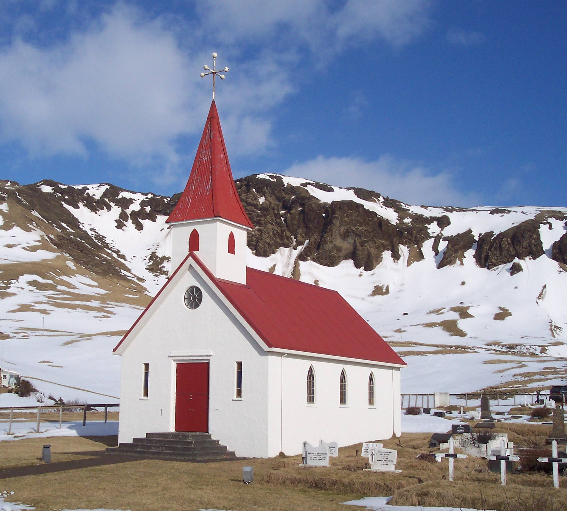 Reyniskirkja er í Víkurprestskalli í Skaftafellsprófastsdæmi. Reynir er landnámsjörð undir Reynisfjalli í Mýrdal. Þar var prestssetur Reynisþinga og útkirkja var að Höfðabrekku.